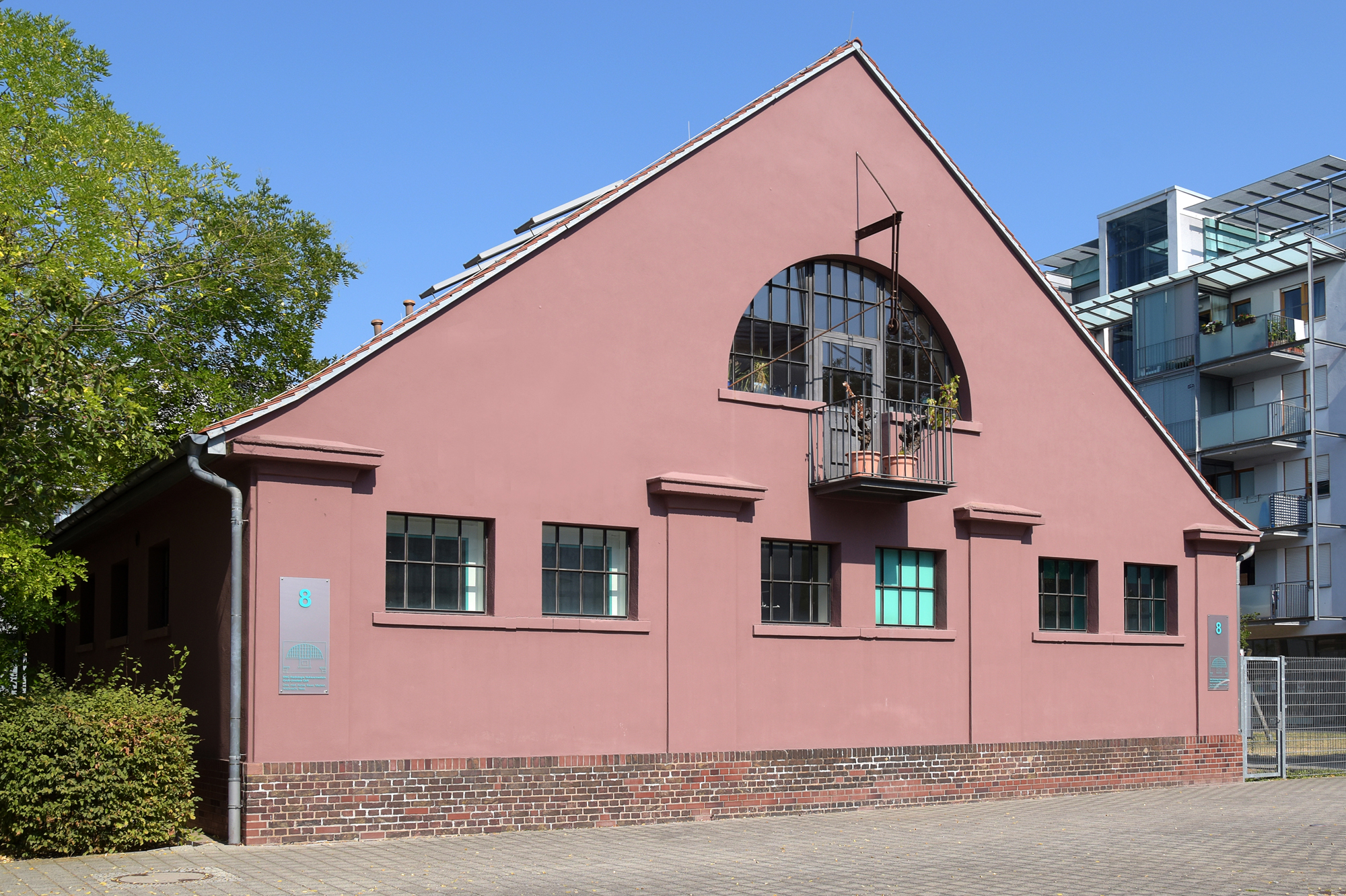 Denkmalgeschütztes Gebäude, ehem. Seuchenstall des Schlachthofs, heute Arztpraxis